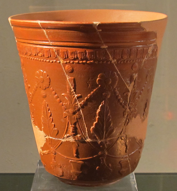 Museo Archeologico Nazionale G.C.Mecenate - MIBAC This is a photo of a monument which is part of cultural heritage of Italy.